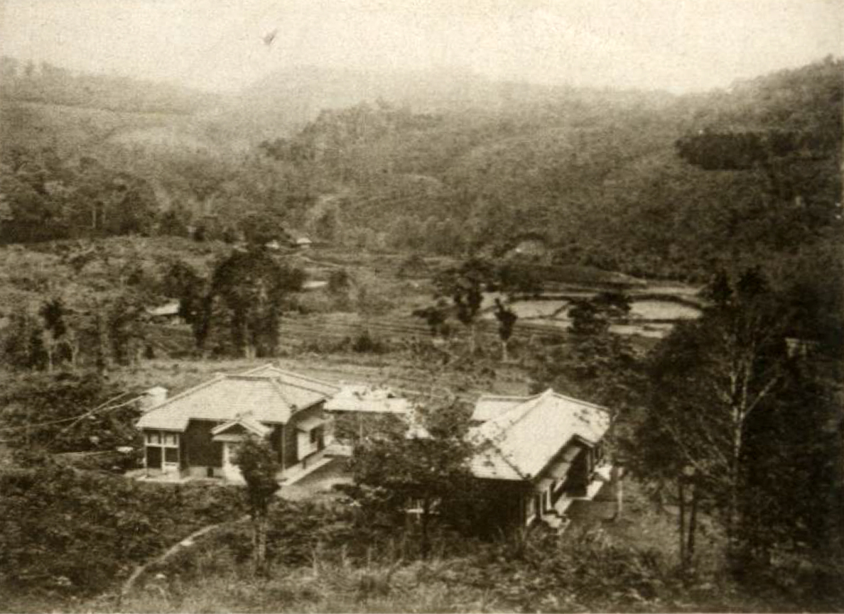 1918年設立的蓮華池藥用植物栽培試驗地，1939年改為林業試驗所蓮華池支所，現為農委會林業試驗所蓮華池研究中心